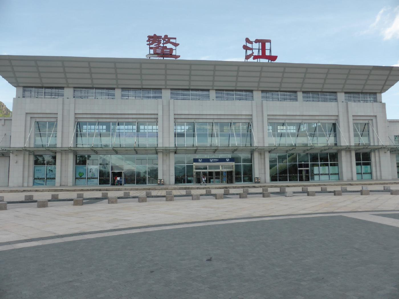 鰲江駅正面入り口